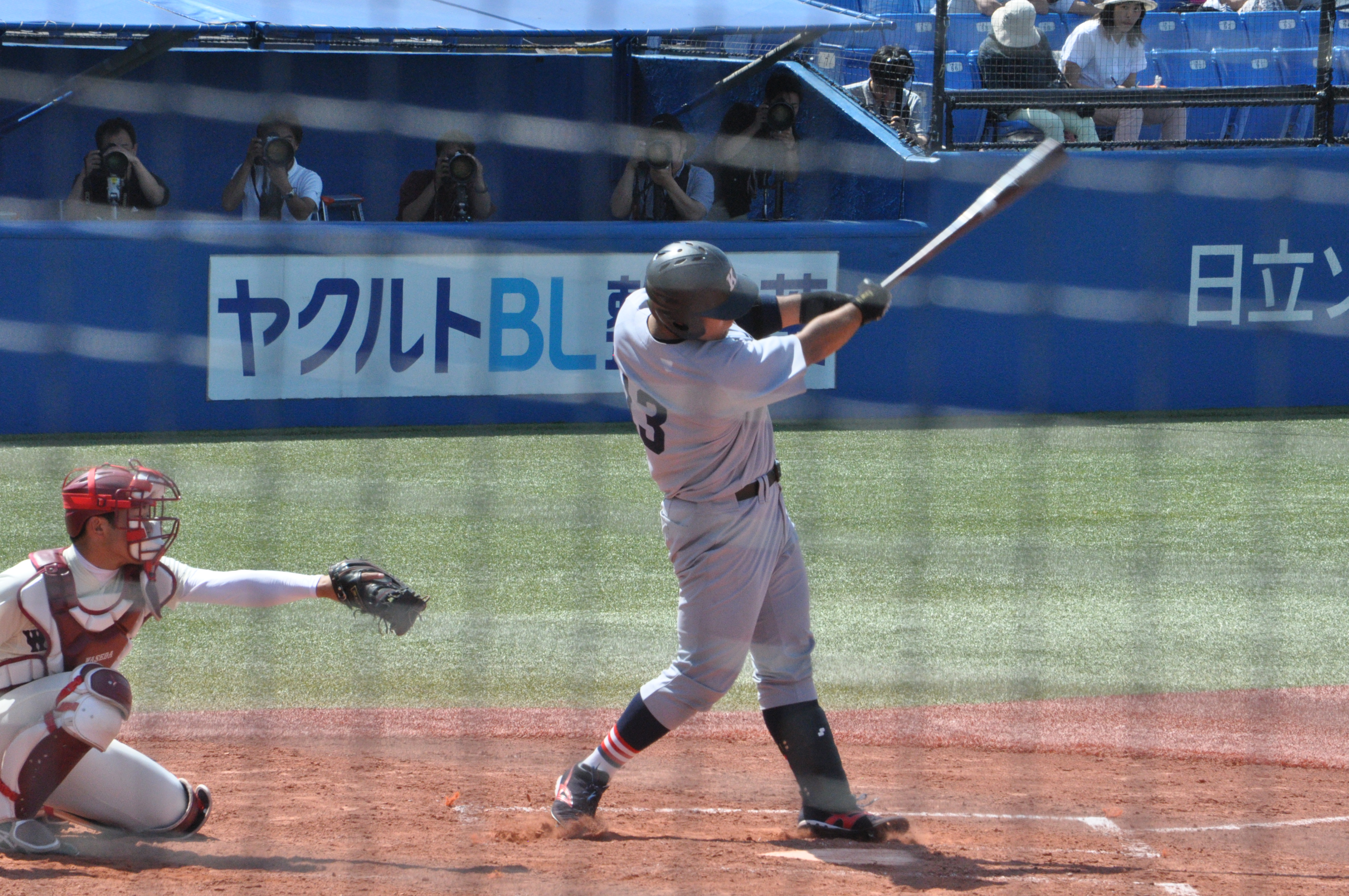 慶応大学 岩見雅紀